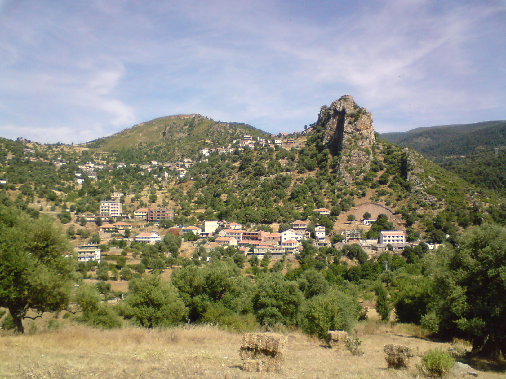 Assif El Hammam, village d'Adekar en Kabylie (Wilaya Béjaïa, Algérie).